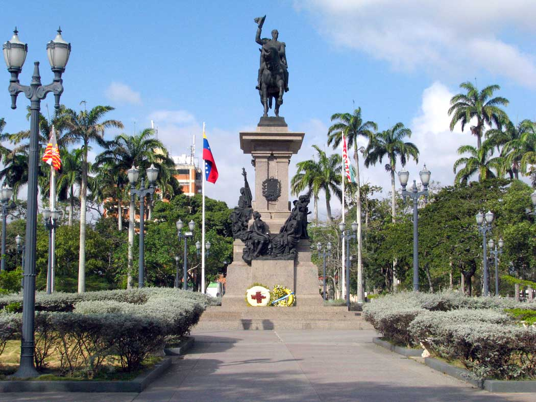 Parque Ayacucho, Barquisimeto estado Lara, Venezuela